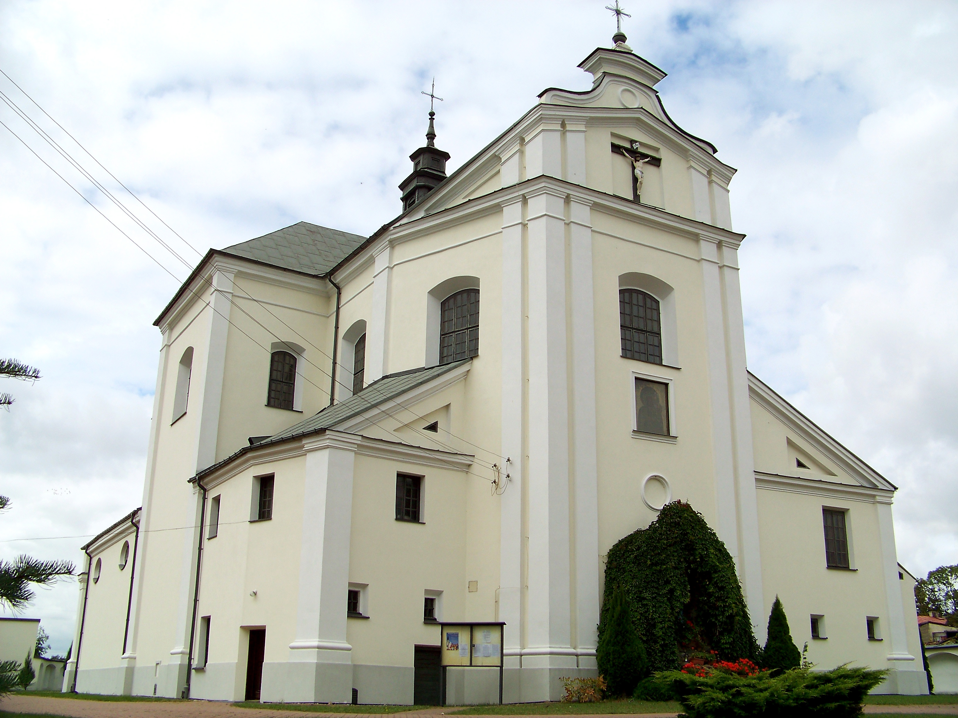 Mordy - kościół p.w. św. Michała Archanioła w Mordach z 1738r., widok od ul. Kardynała Stefana Wyszyńskiego